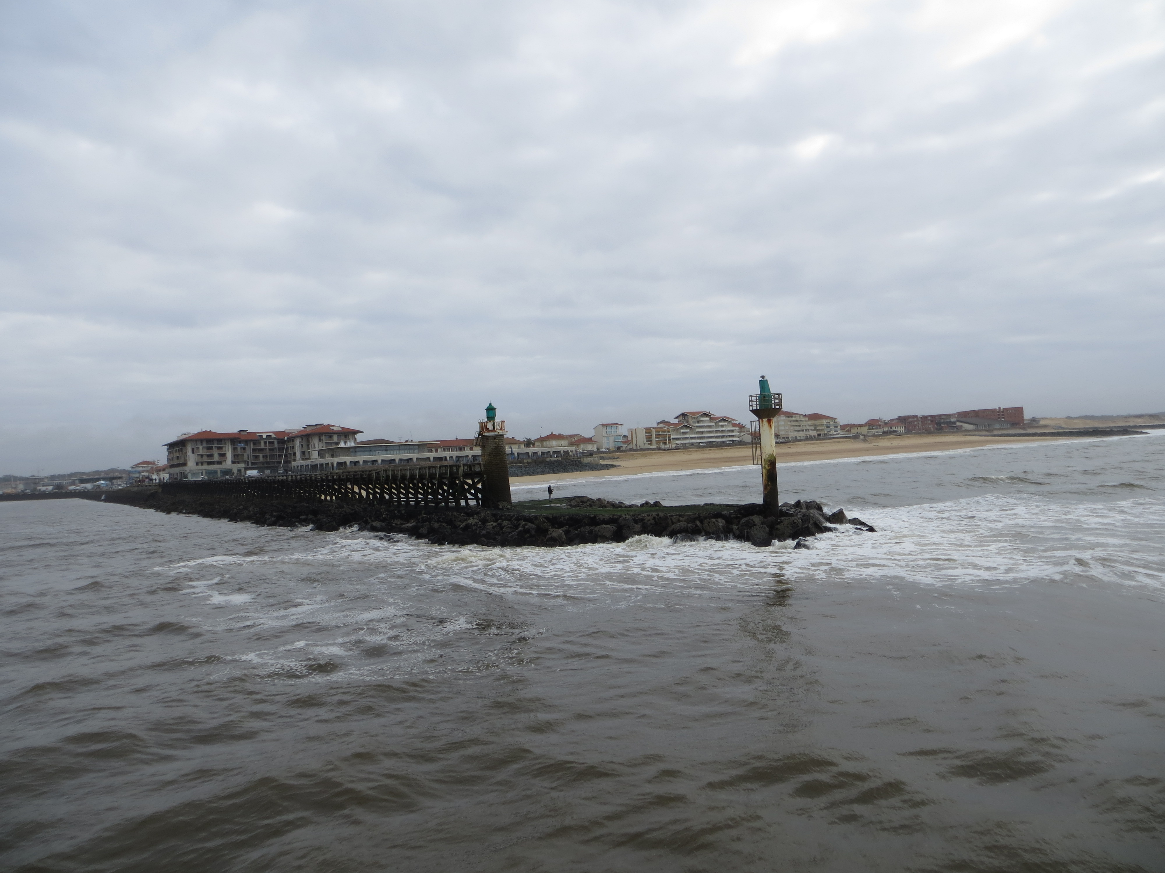 Capbreton